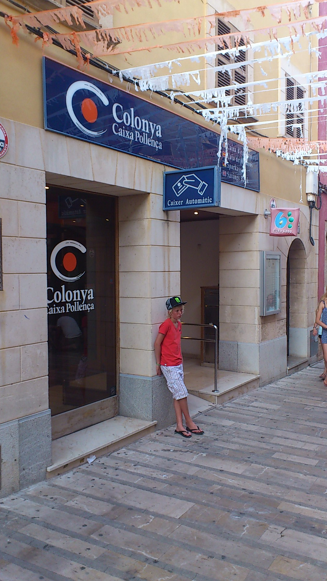 Sucursal de Colonya Caixa Pollença en Alcudia (Mallorca). Carrel des Moll, 23